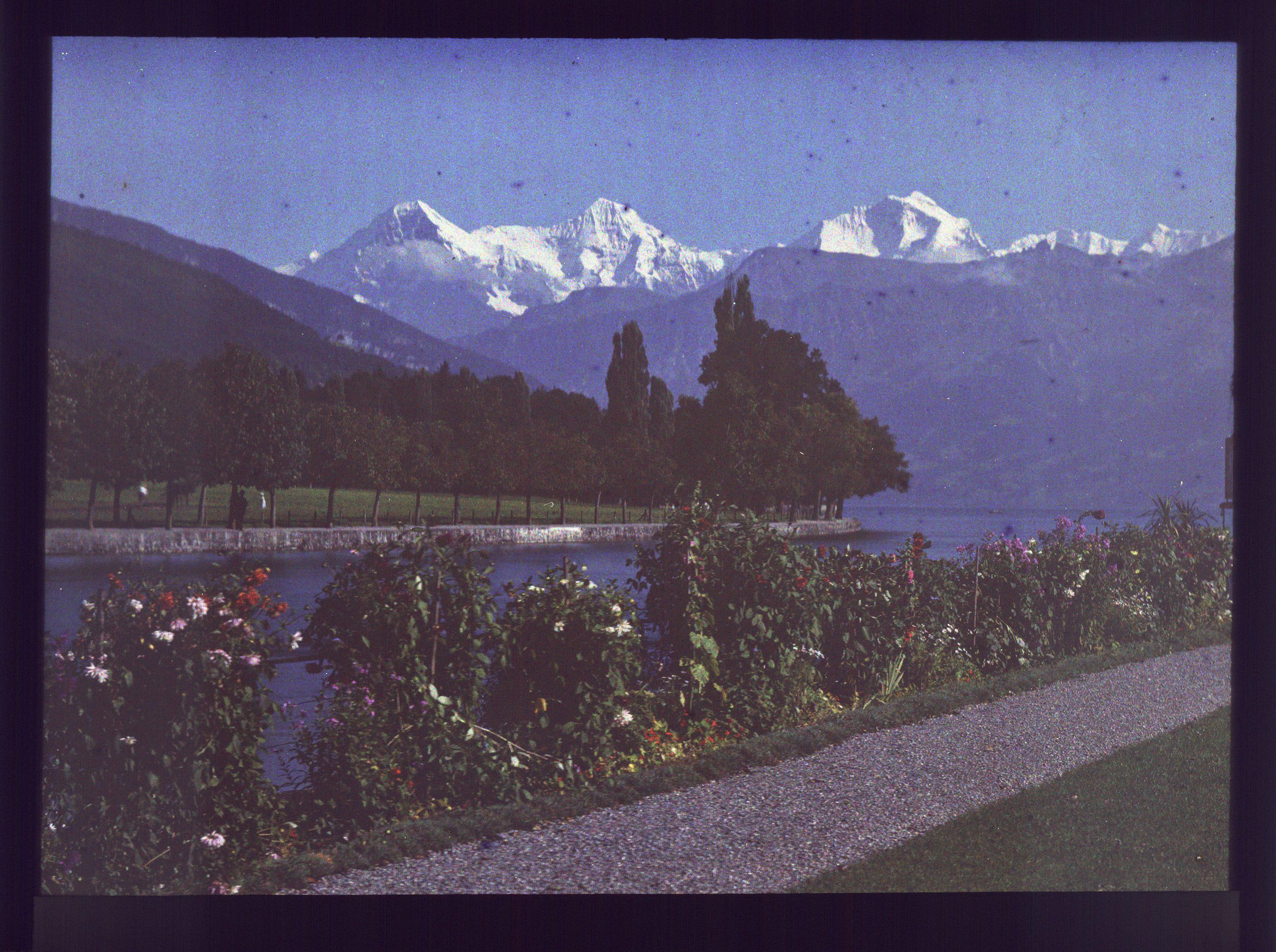 Blick von der Schadau über den Thunersee auf Eiger, Mönch und Jungfrau